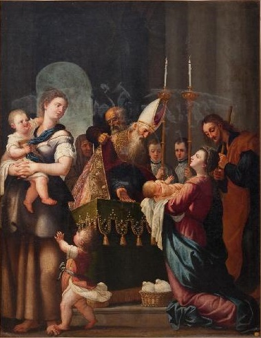 La obra representa el momento en que el Niño Jesús fue presentado por sus padres, según lo prescrito en la ley judía, en el Templo de Jerusalén.